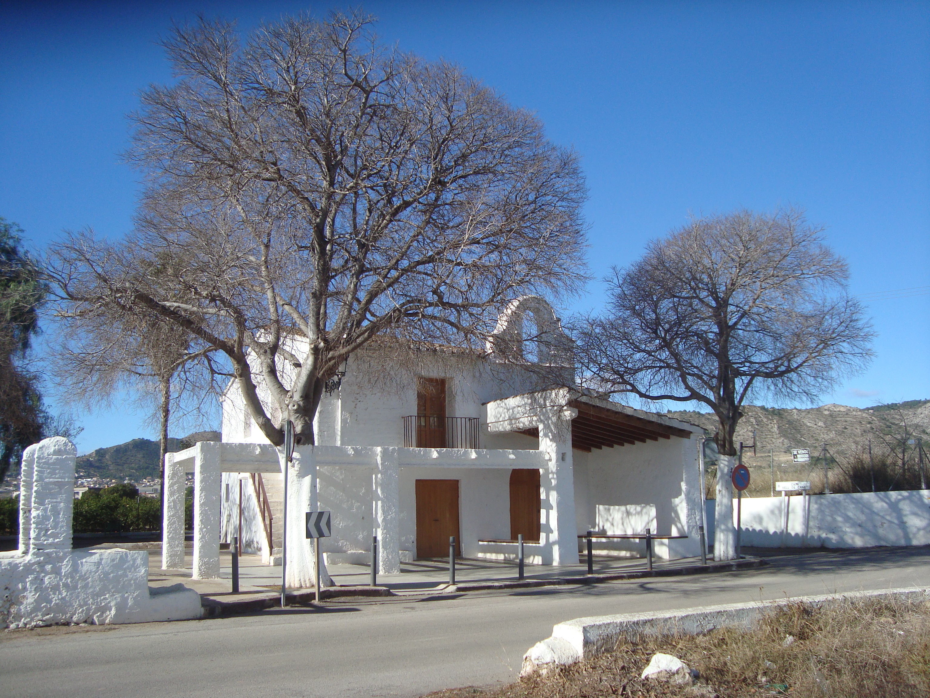 Ermita de San Roque de Canet, Castellón